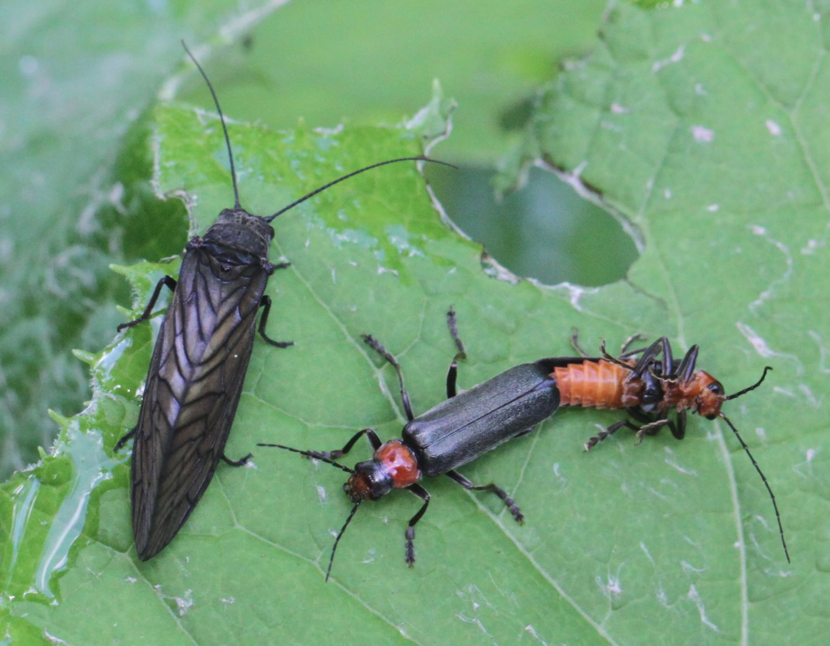 Gemeine Wasserflorfliege Sialis lutaria links im Bild; paarende Käfer der Art Ancistronycha abdominalis rechts im Bild; am 13. Juni 2019 am Schwarzen Grat